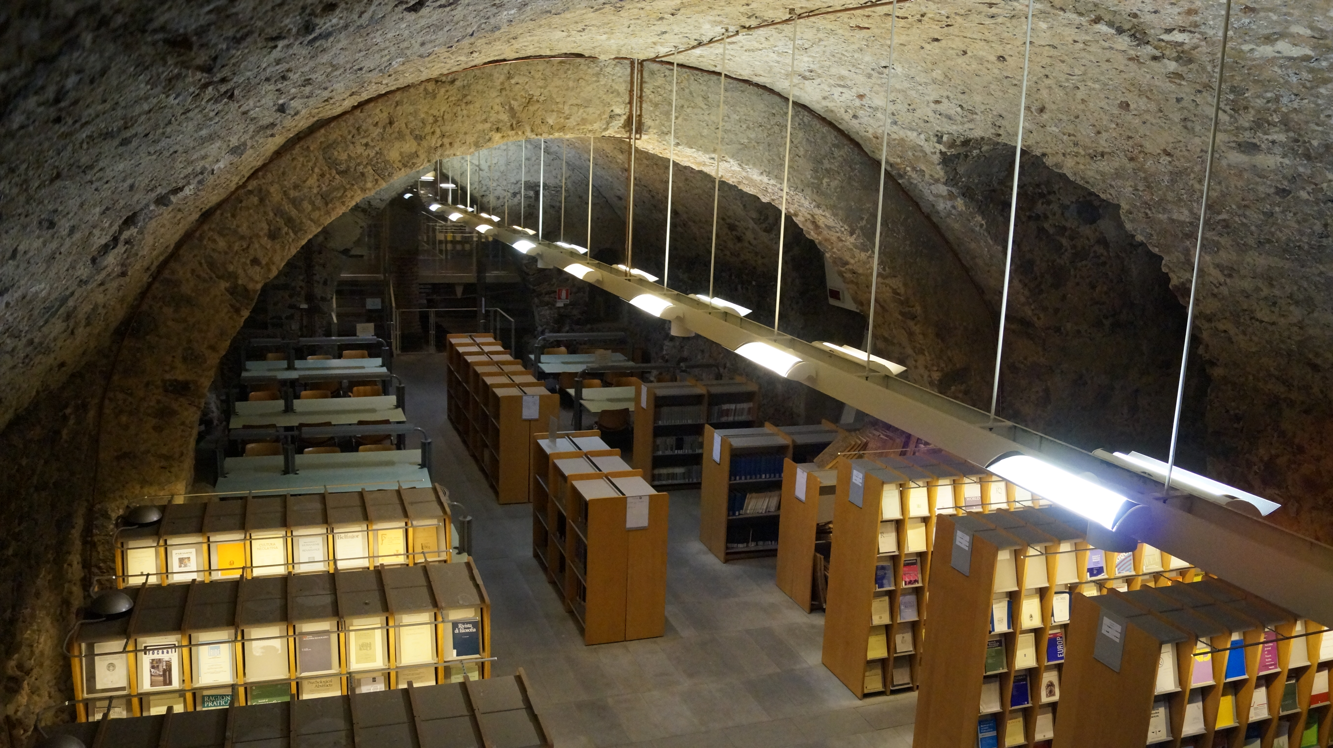 Biblioteca del DISUM dell'Università degli studi di Catania